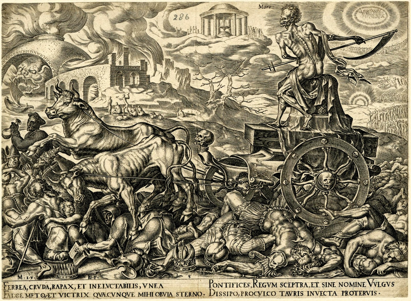 Triomf van de Dood, gravure